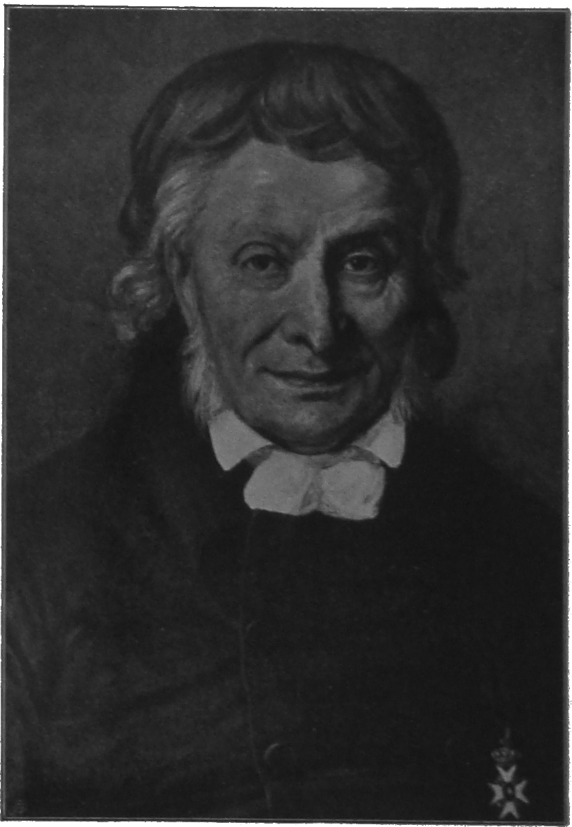 Den norske legen og professoren Michael Skjelderup (1769–1852).